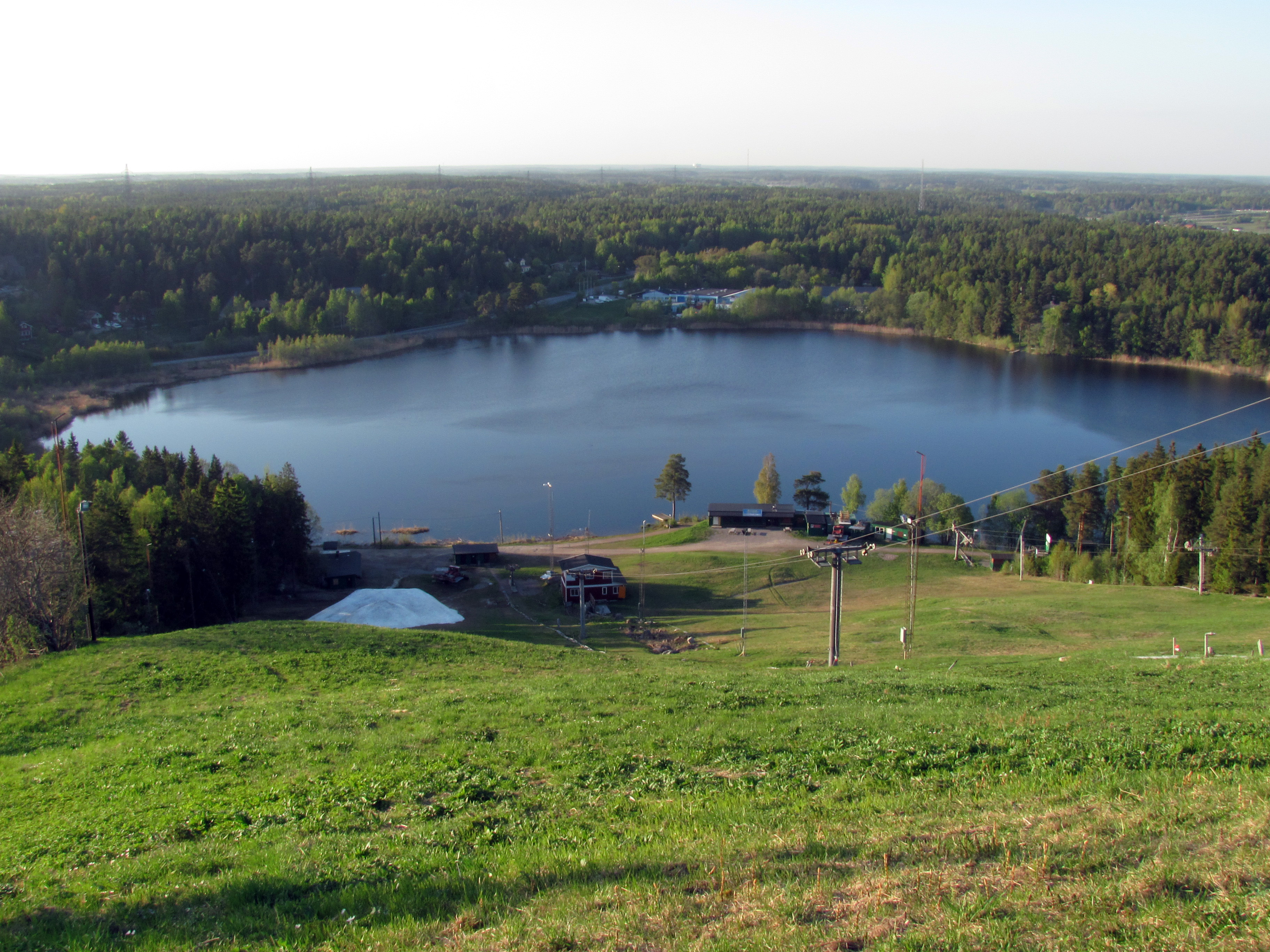 Väsjöbacken, utsikt över Väsjön